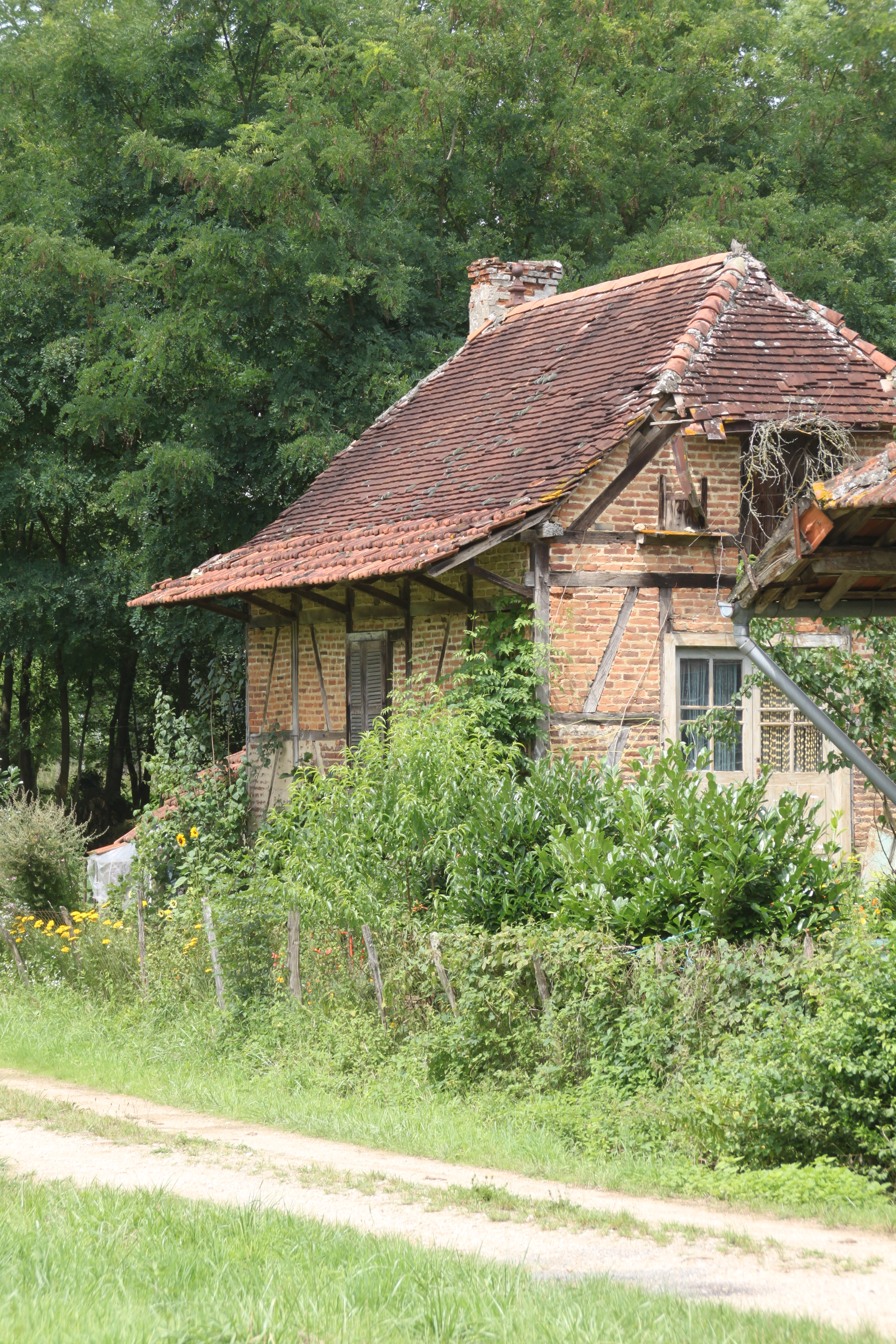 Bellevesvre, altes Bressehaus am Ufer der Brenne